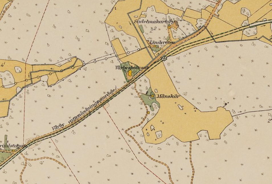 Del av "1934 års karta över Stockholm med omgivningar" med del för Vårby skola, Sadelmakartorp, Lindvreten och Månskär